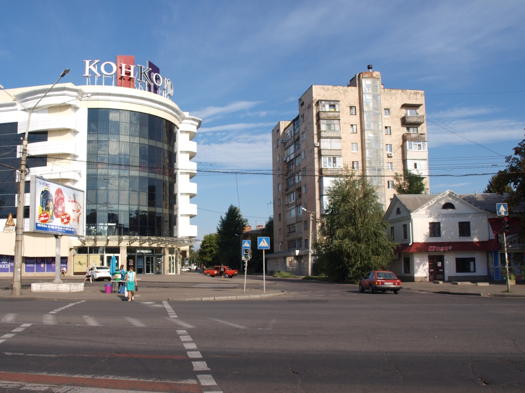 Полтава ріг Фрунзе і О.Вишні